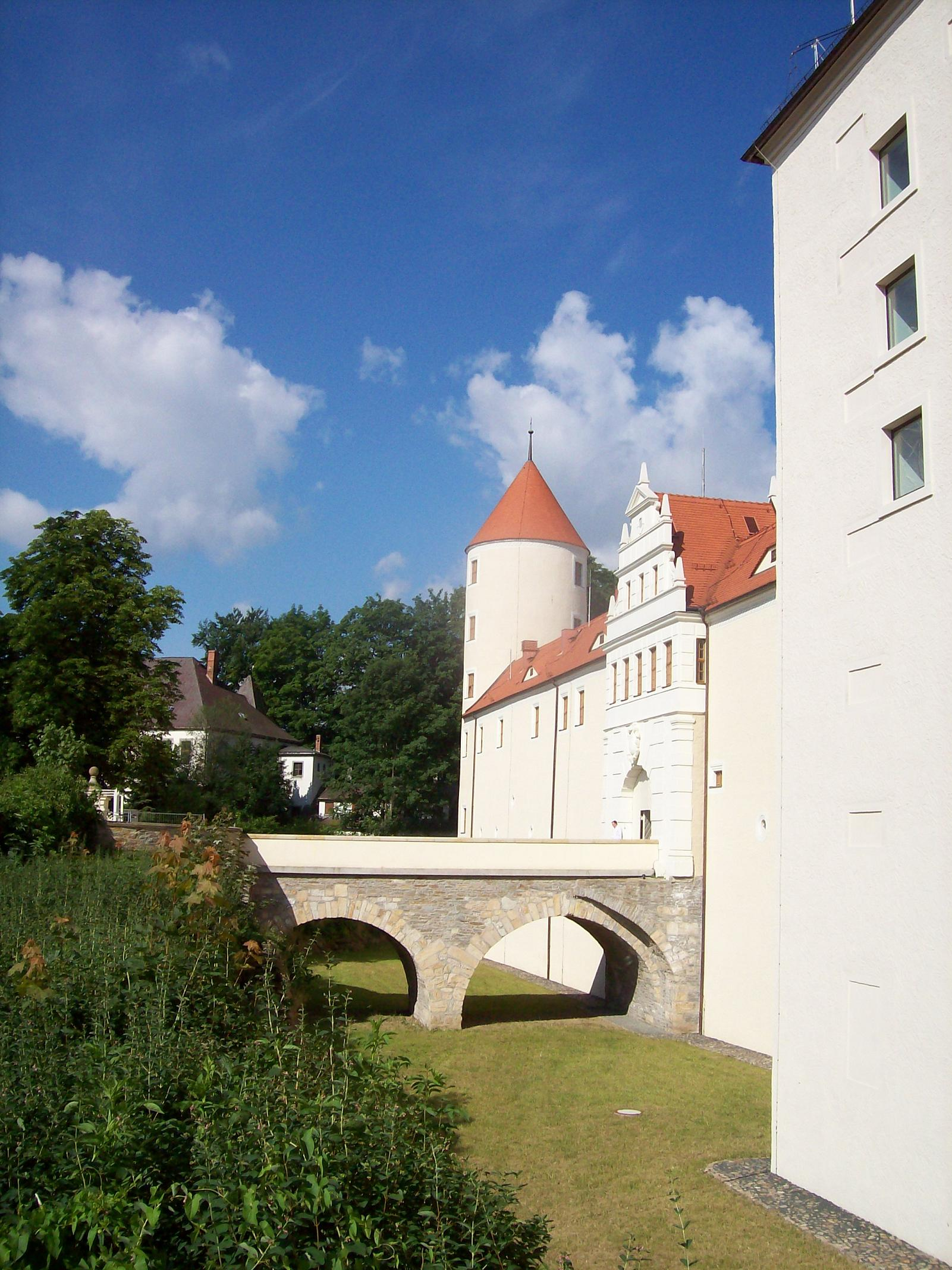 Schlossbrücke Freudenstein Freiberg